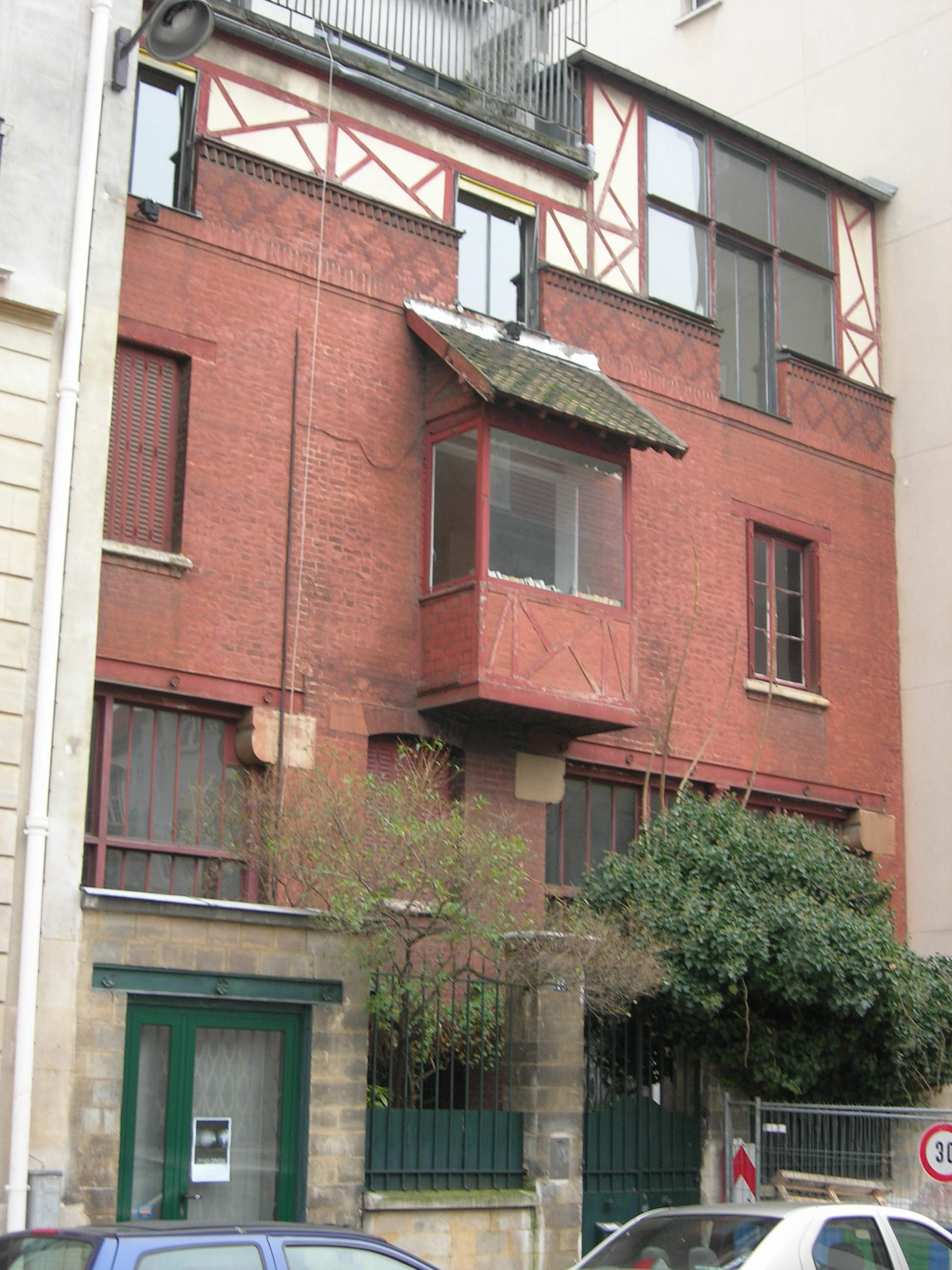 L'atelier que le sculpteur français Carlo Sarrabezolles a occupé au 16 rue des Volontaires, Paris 15e, de 1926 à sa mort en 1971